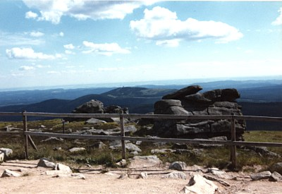 Blick vom Brocken über den Harz.